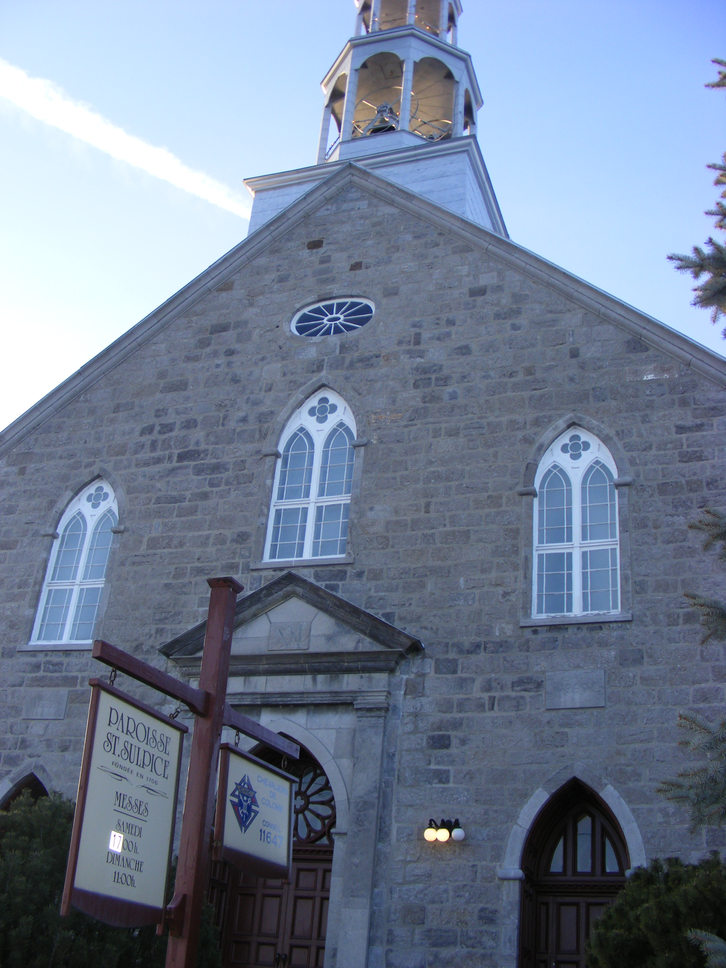 Église de Saint-Sulpice, Lanaudière, Québec, Canada.